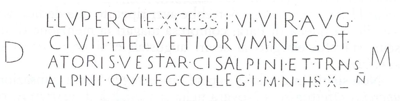 Fara Novarese, Palazzo Contini-Dessilani, Sarcofago di Lucio Luperco